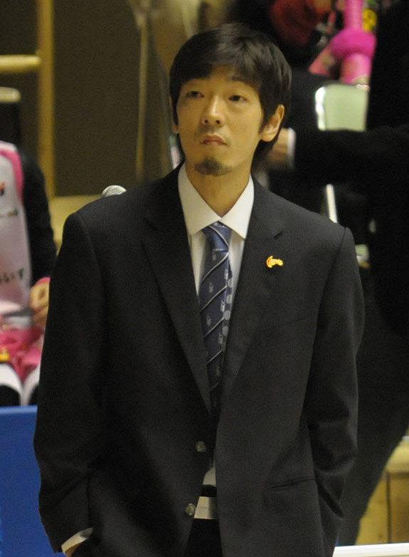 大分ヒートデビルズ、鈴木裕紀ヘッドコーチ。秋田県立体育館で。